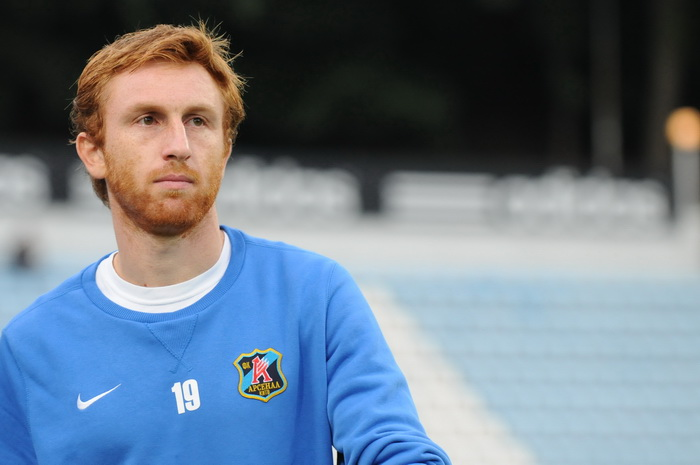 Alexander Kobakhidze in 2012